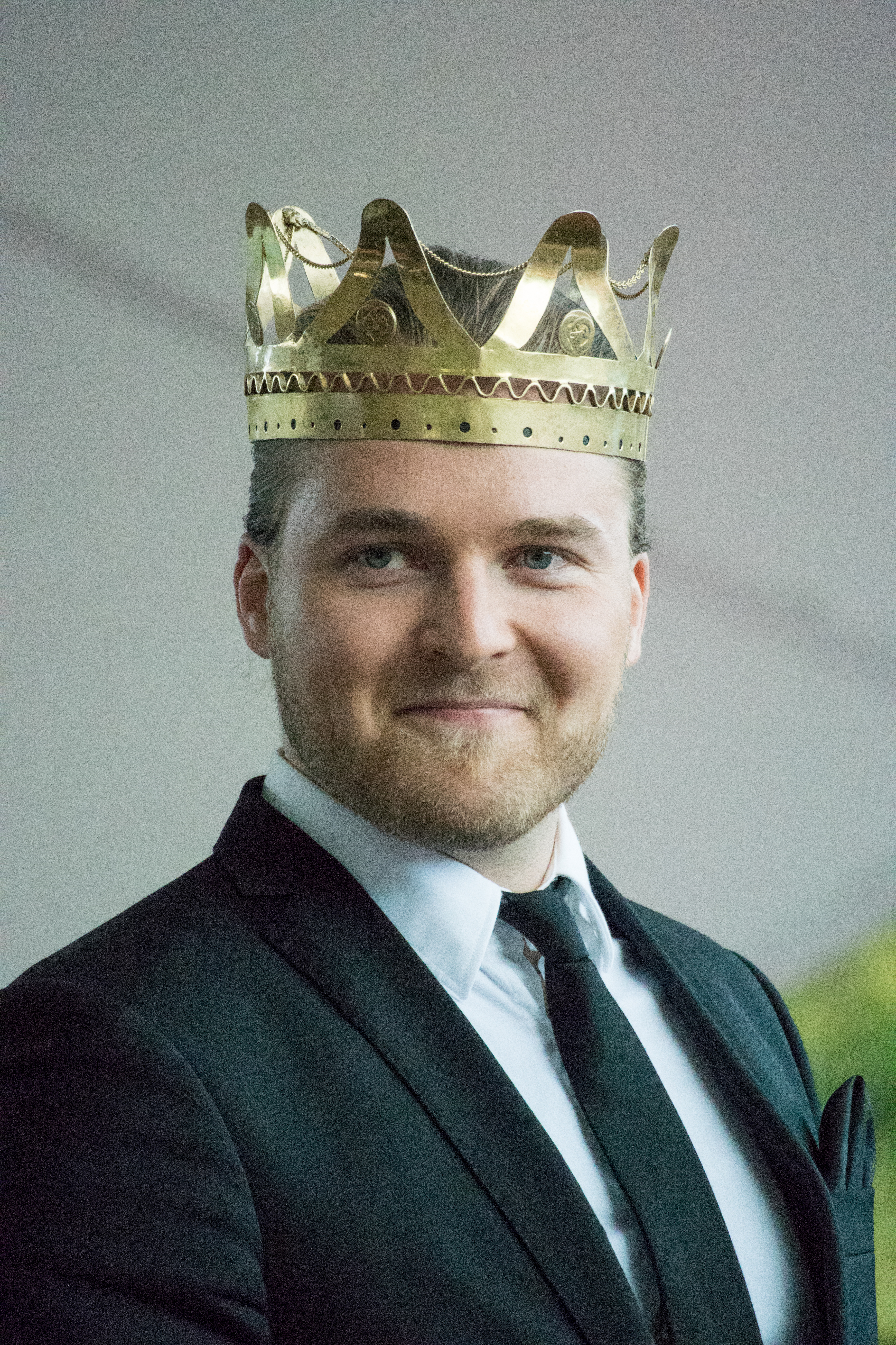 Teemu Roivainen, suomalainen laulaja